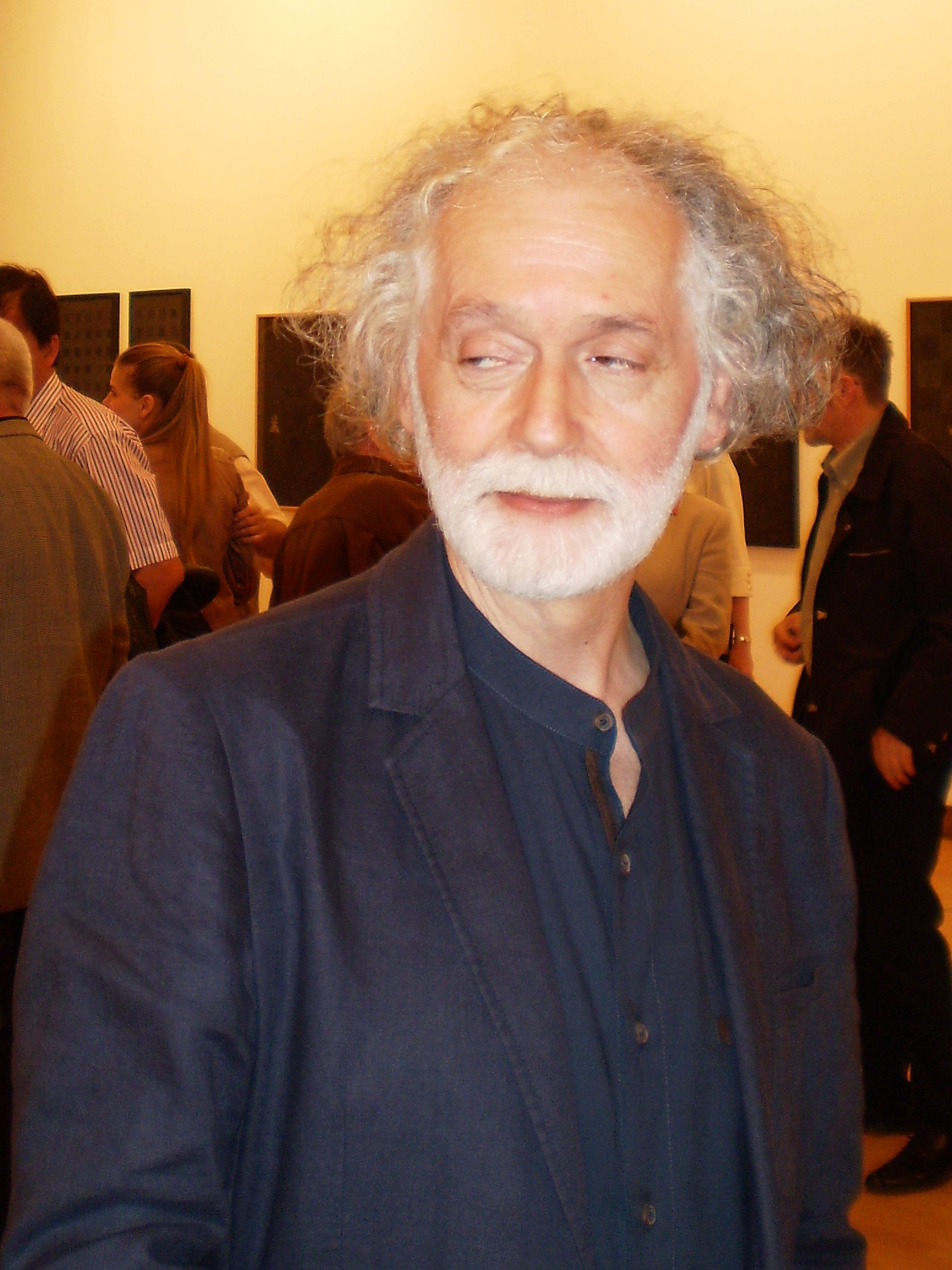 Srpski (latinica): Dragan Đ Momčilović , slikar, Niš, Srbija